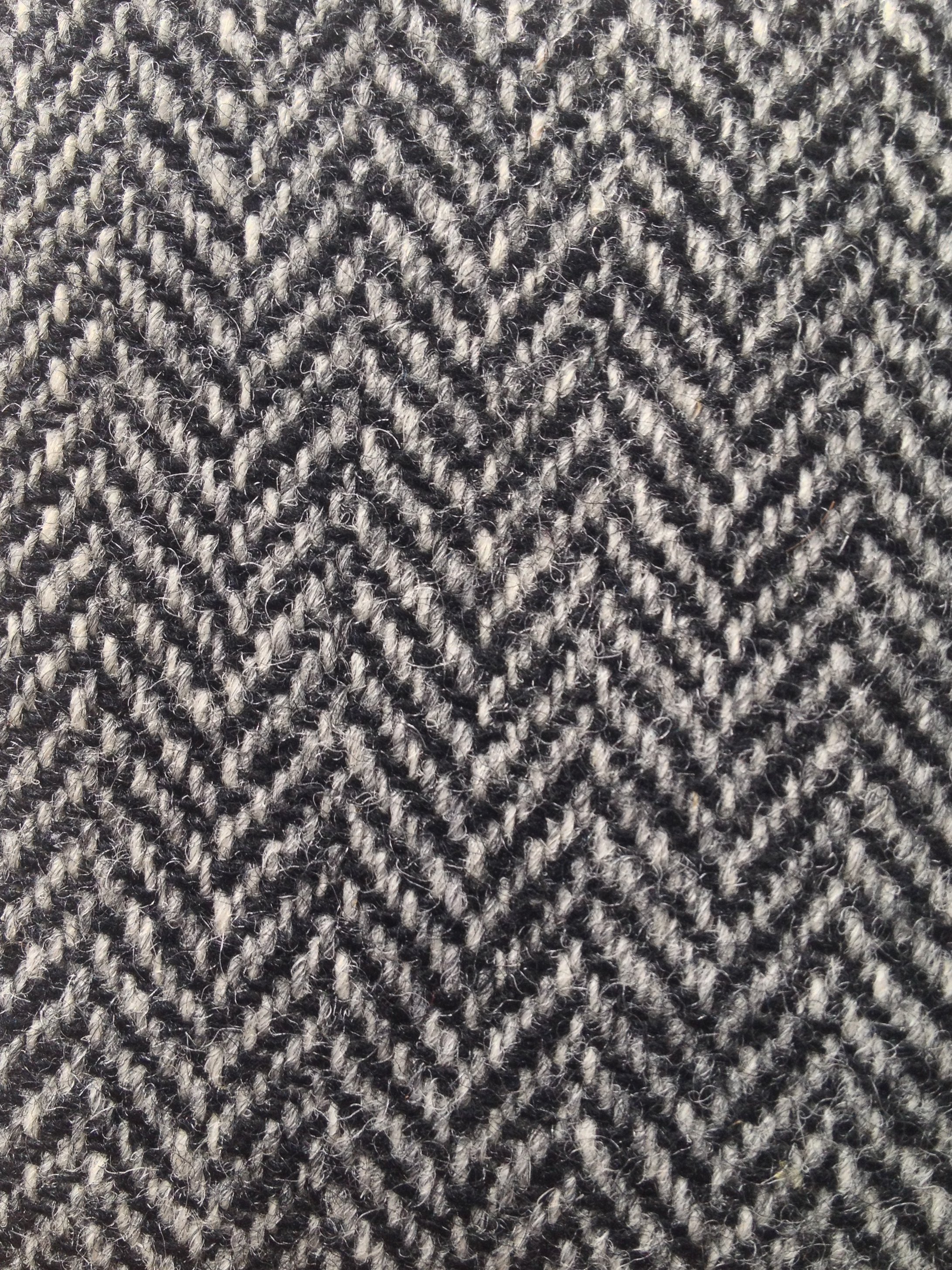 Cloth Harris Tweed Herringbone Black/Grey